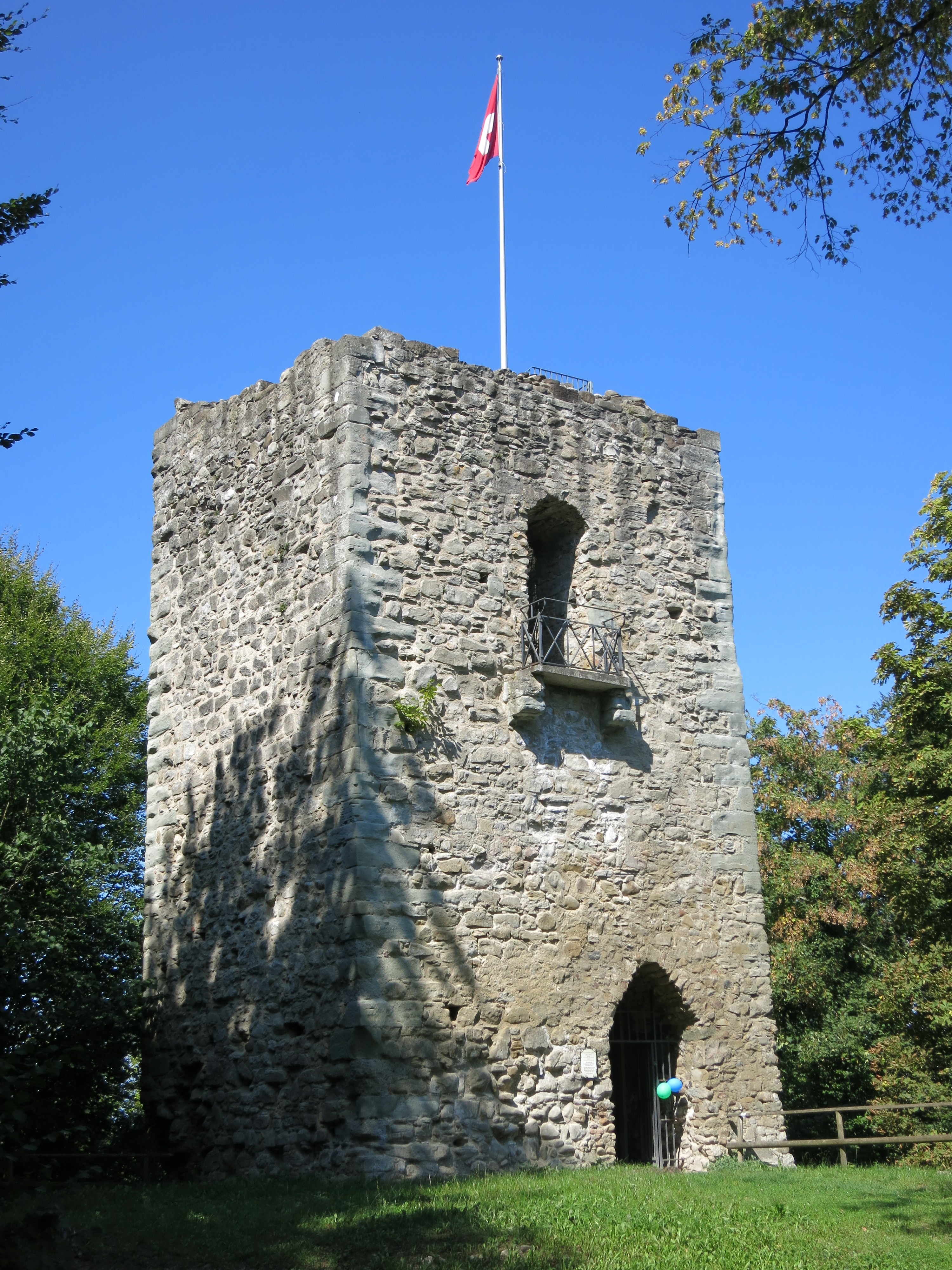 Ruine Castell